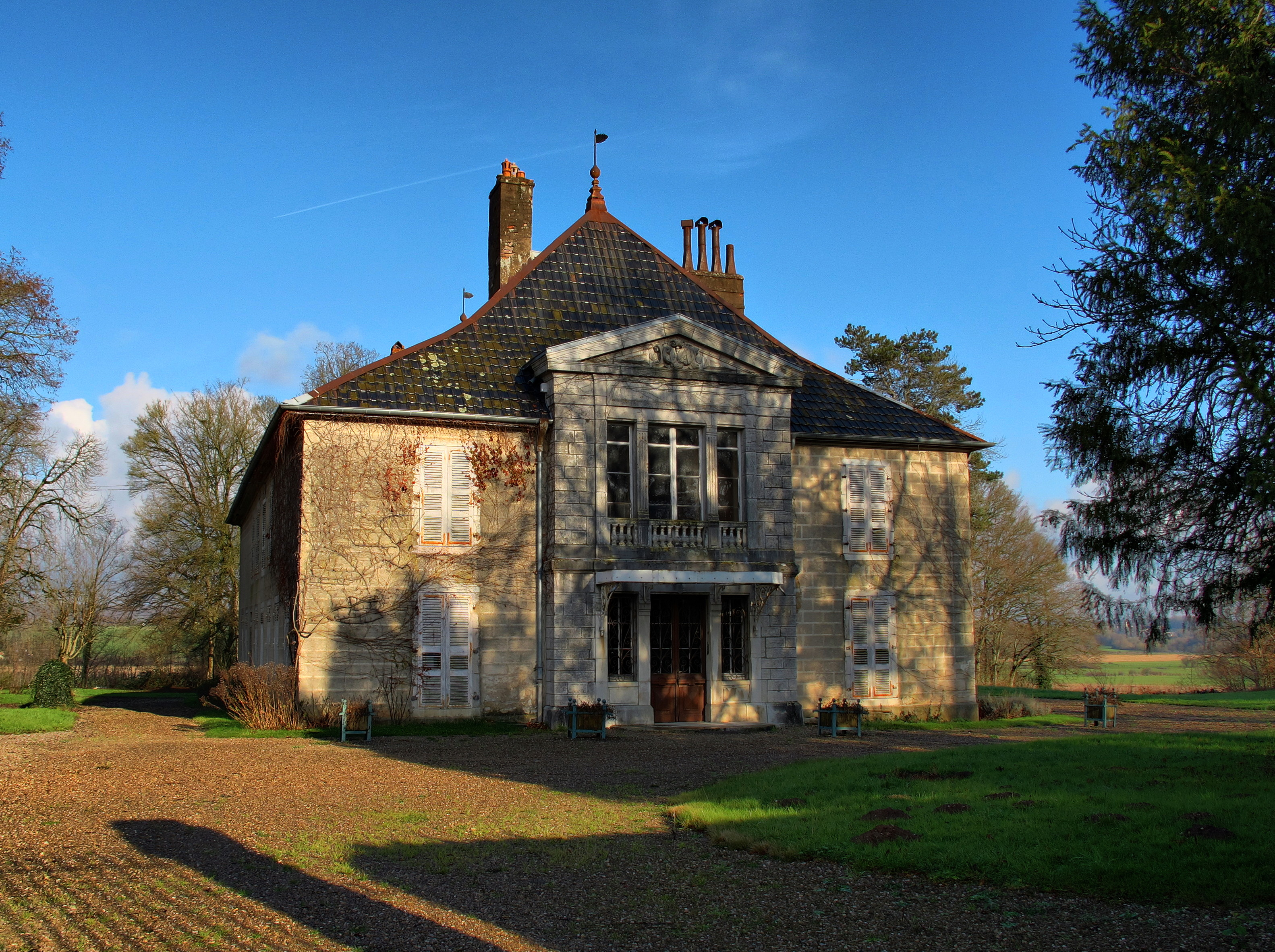 Inscrit aux monuments historiques sous le numéro : PA00132845